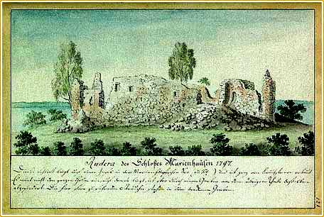 1797 Brotze joonistus Vilaka piiskopilinnusest.